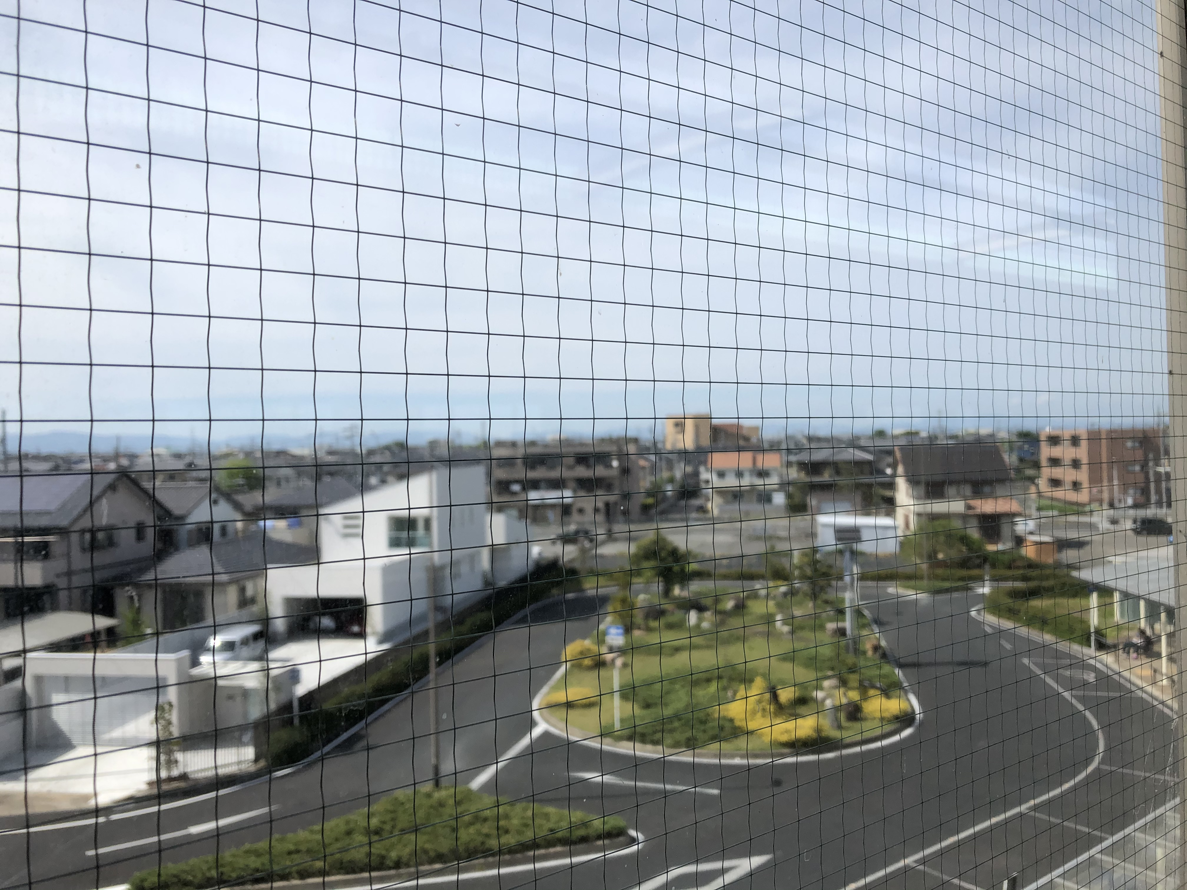 藤浪駅北口